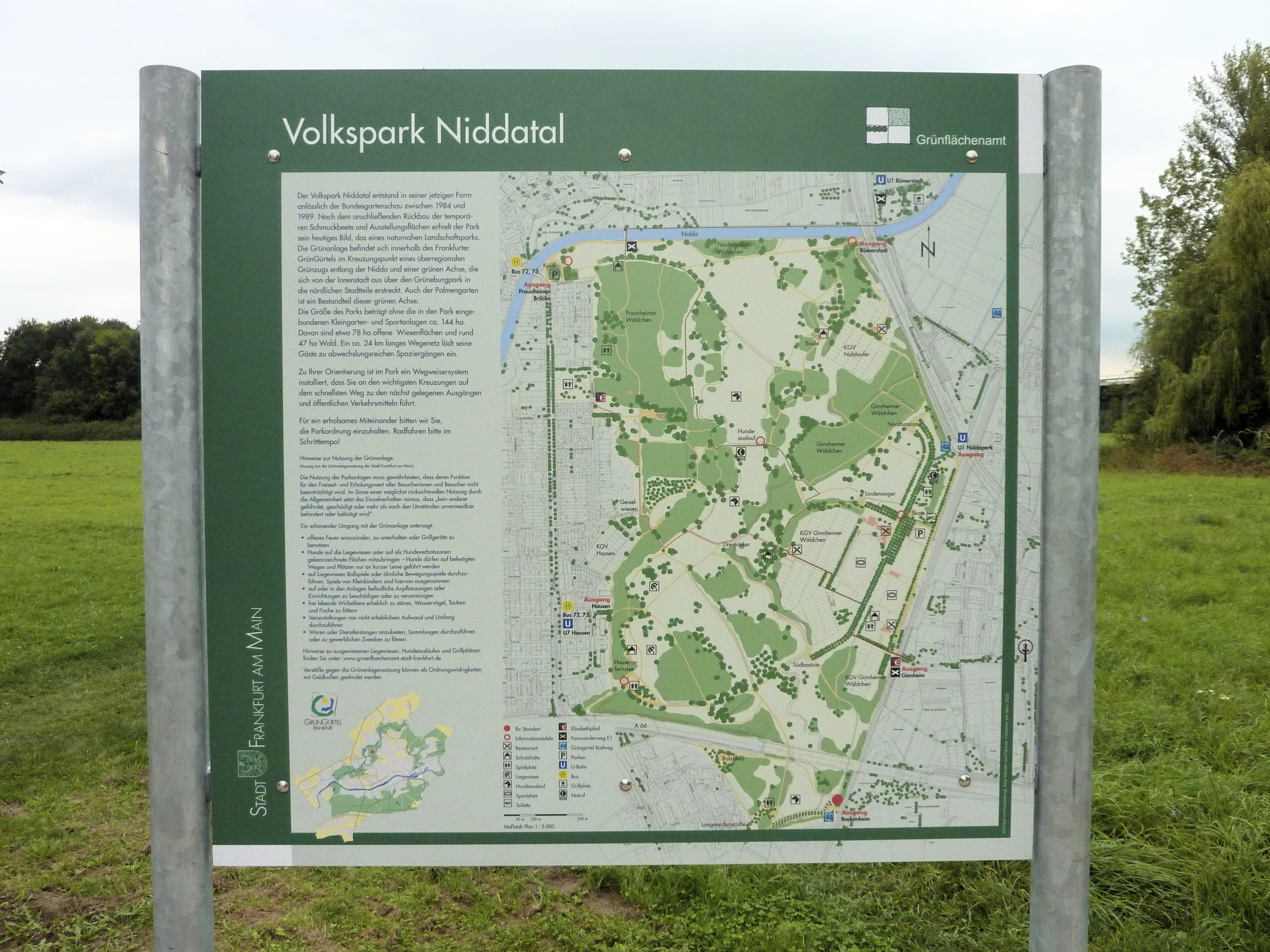 Frankfurt am Main, Volkspark Niddatal: Eine der dauerhaft im Park aufgestellten Infotafeln des örtlichen Grünflächenamtes mit Informationen zur Geschichte des Geländes, Parkordnung und Lageplan.